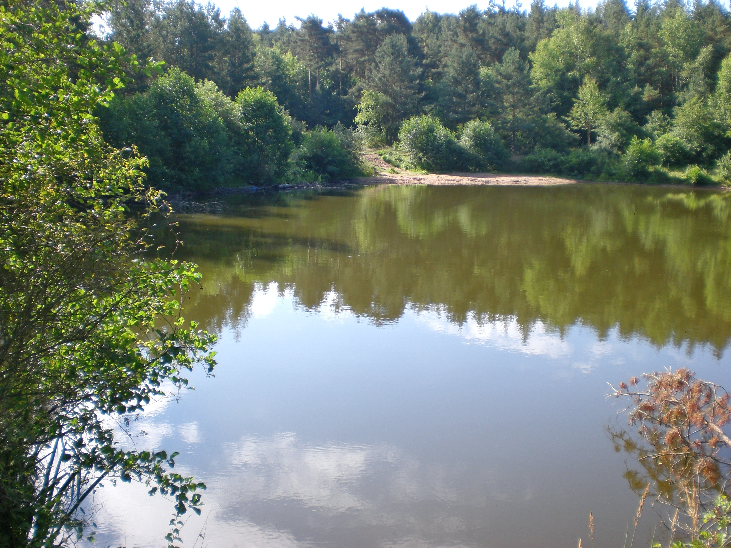 Jägersee im August 2012